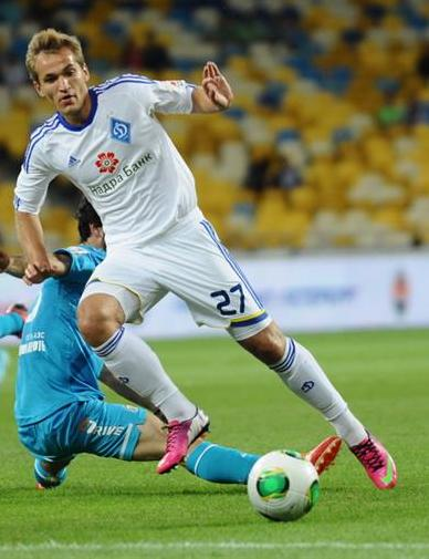 Євген Макаренко — український футболіст під час виступів за Динамо